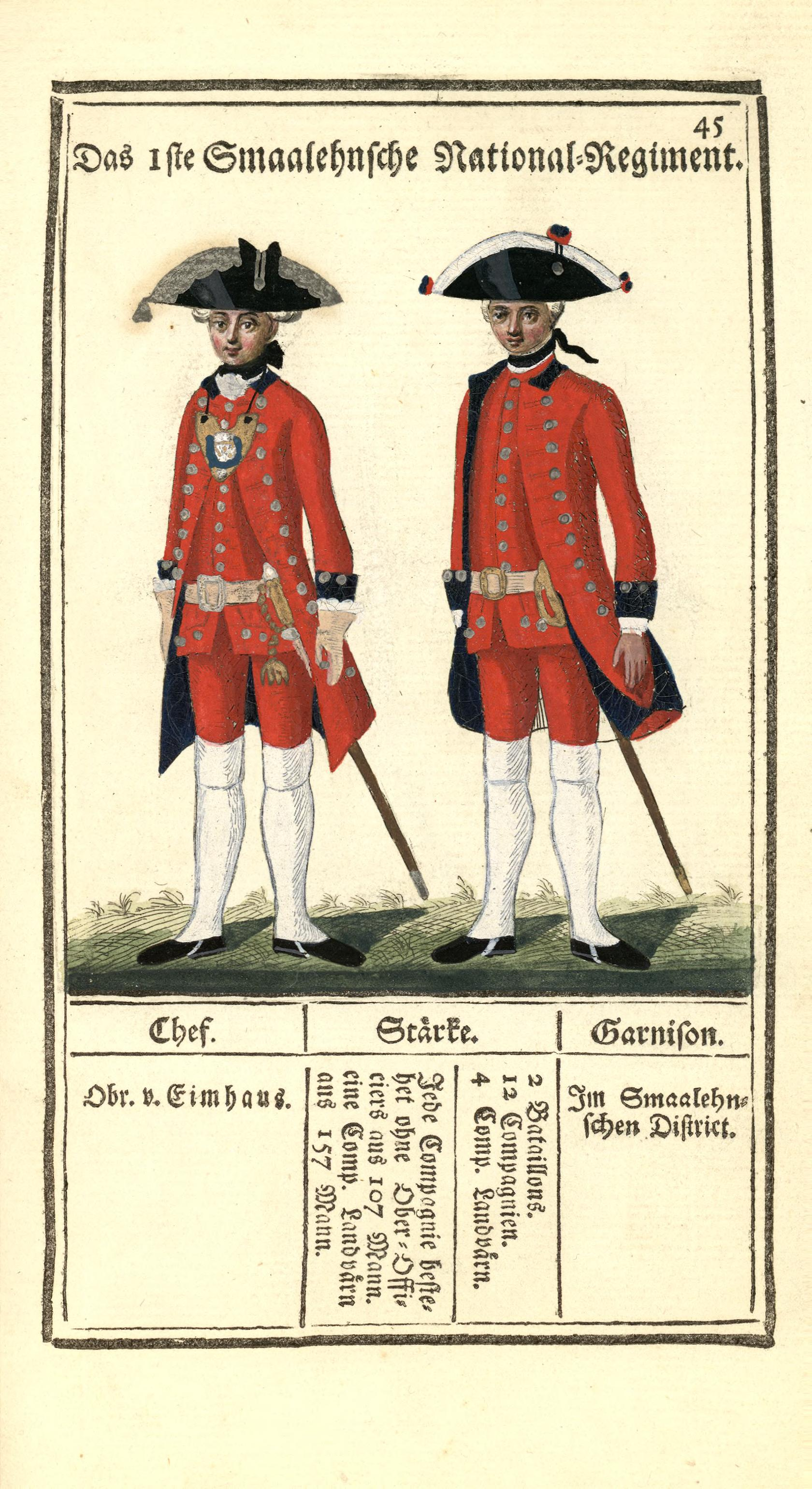 Illustrasjon hentet fra boken "Vorstellung der sämtlichen Königl. Dänischen Armee" av Bertram, Carl og utgitt av Carl Bertram (dk, 1763) "1ste Smaaleehnsche National-Regiment"